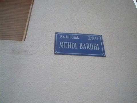 Rruga "Mehdi Bardhi" ne Prizren